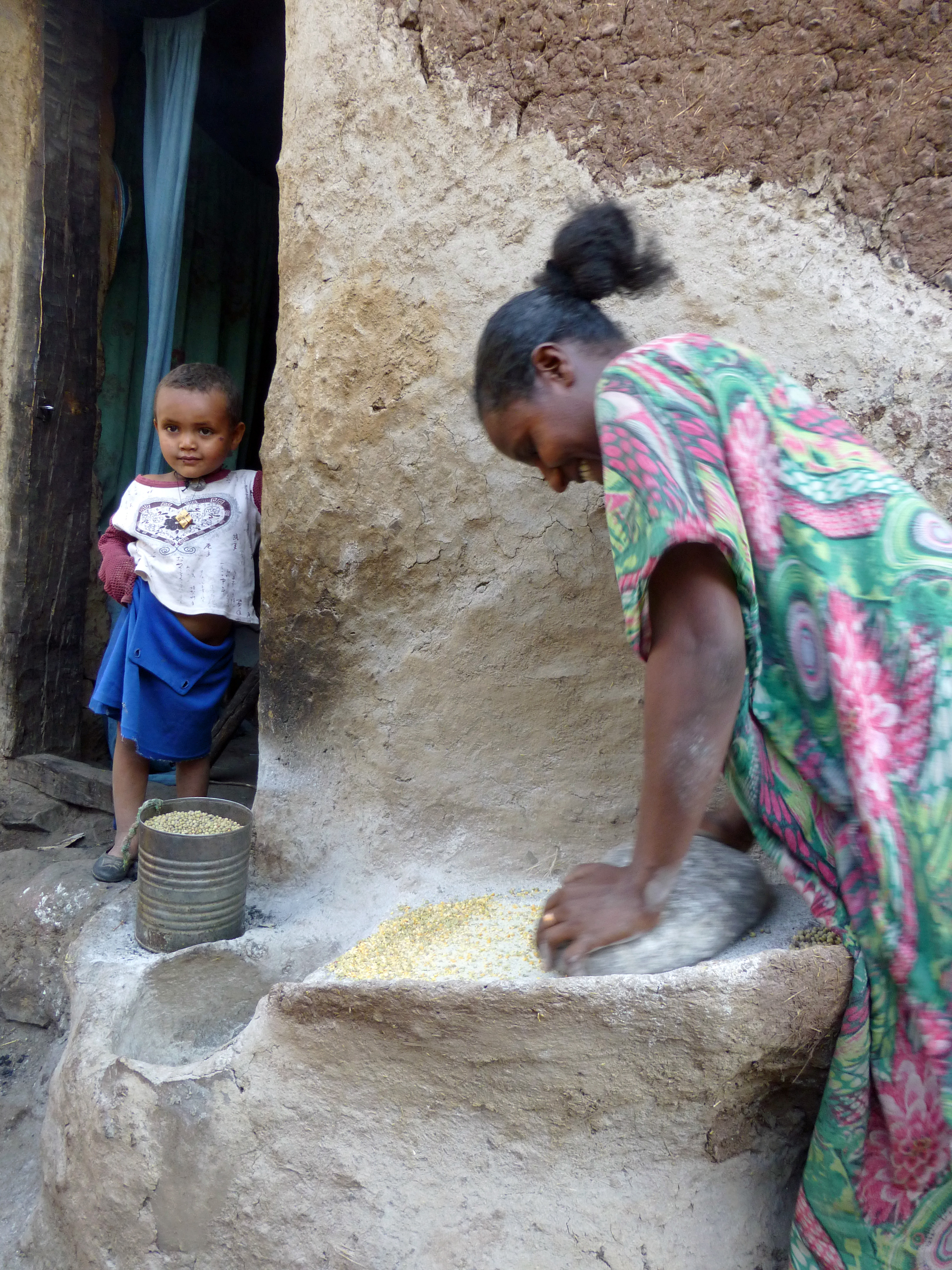 Lalibela (Ethiopie) : mouture du sorgho en farine à l'aide d'une pierre